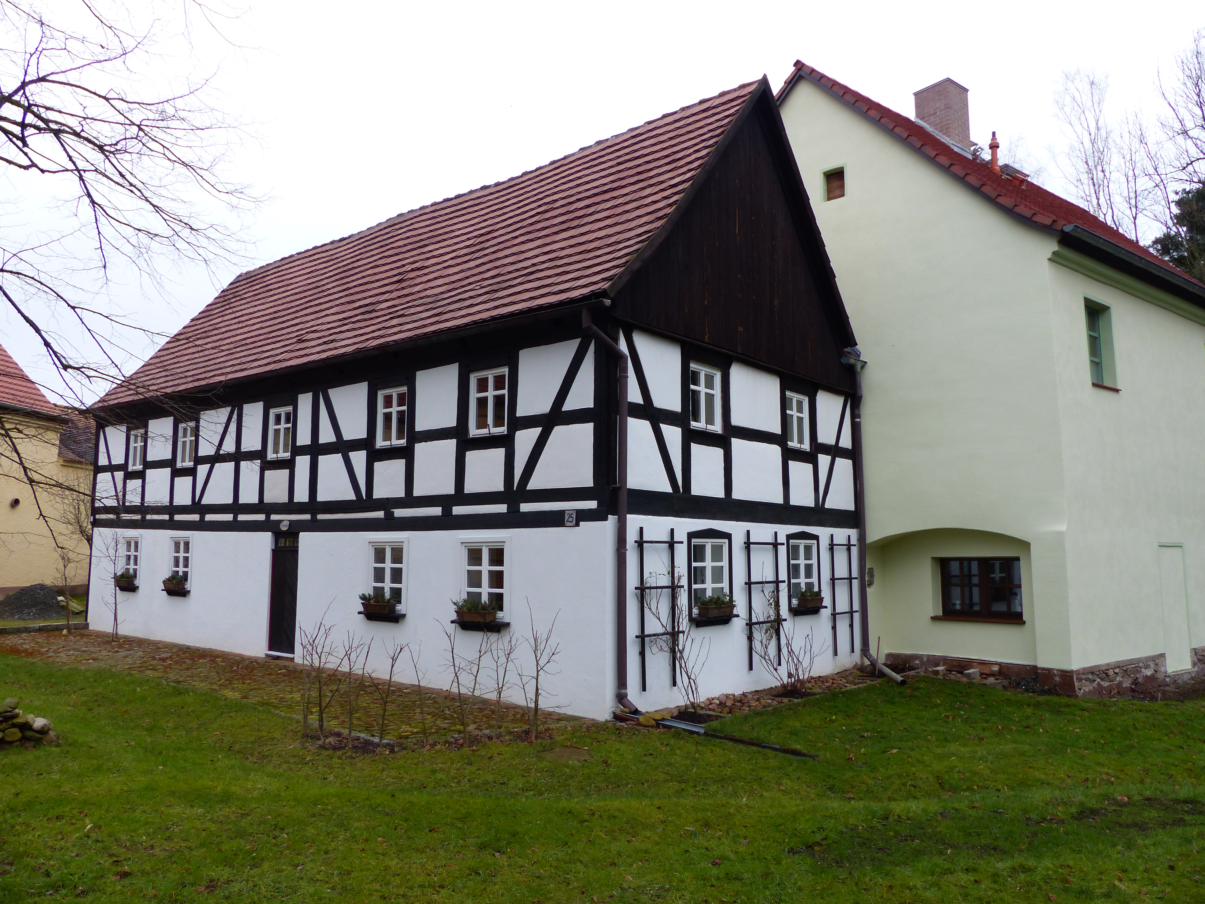 Umgebindehaus, Am Elstergrund 25, Dörgenhausen, Hoyerswerda